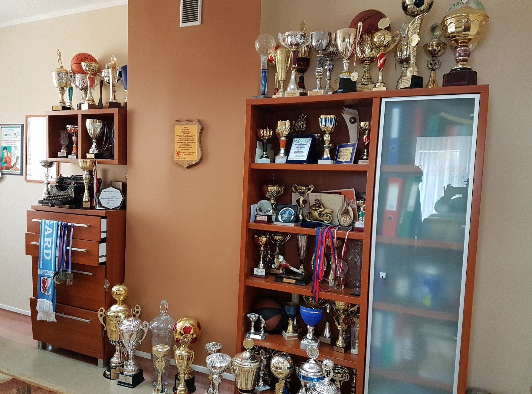 Pamiątki Stowarzyszenia Spójnia Stargard